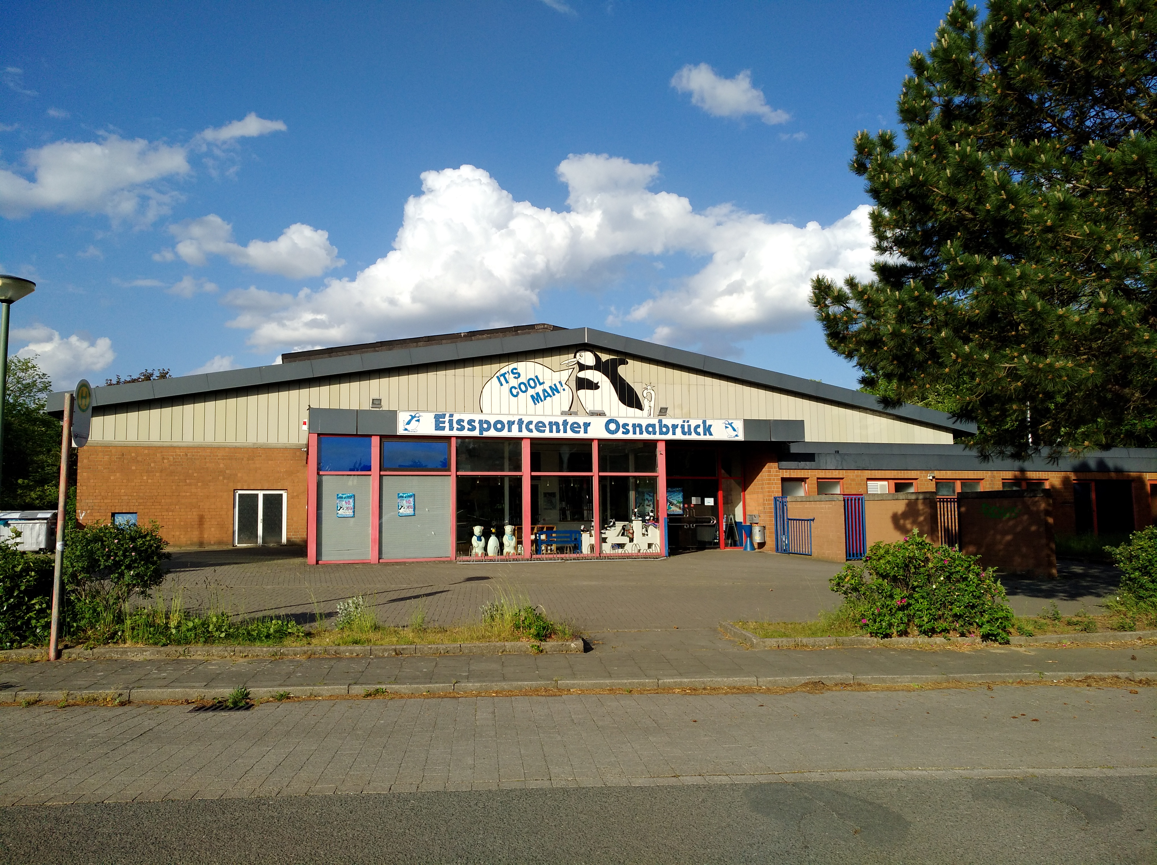 Eissportcenter Osnabrück an der Vehrter Landstraße